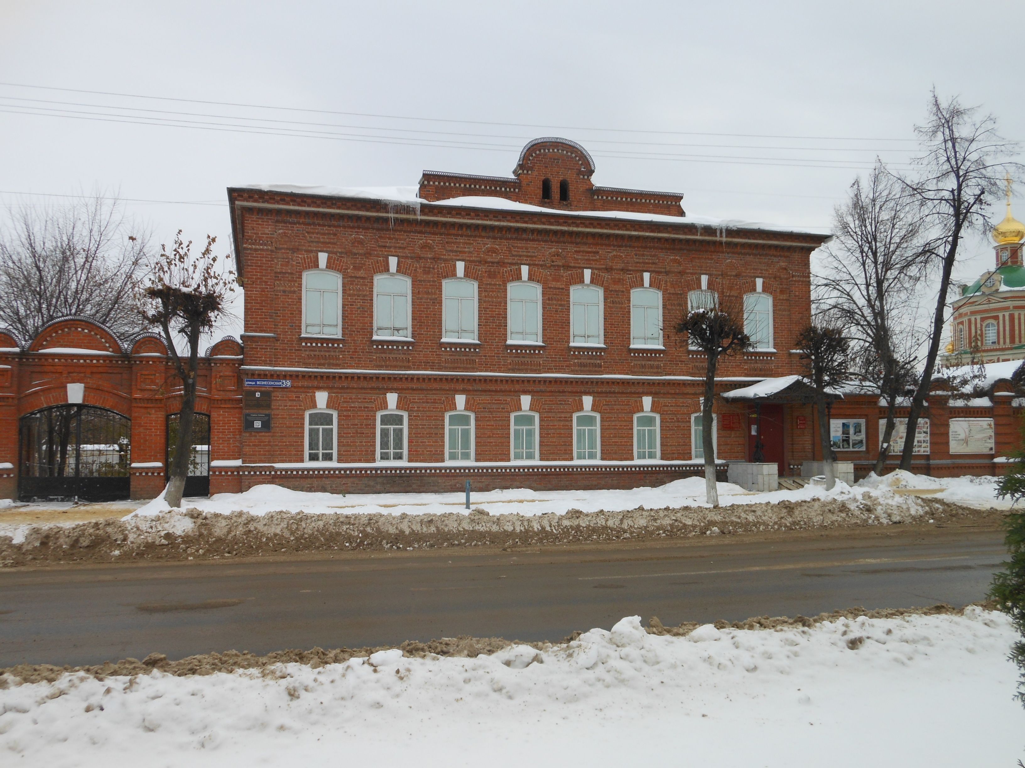 Усадьба Чулкова (Республика Марий Эл, Йошкар-Ола, улица Карла Маркса, 37, 39, 39-а)